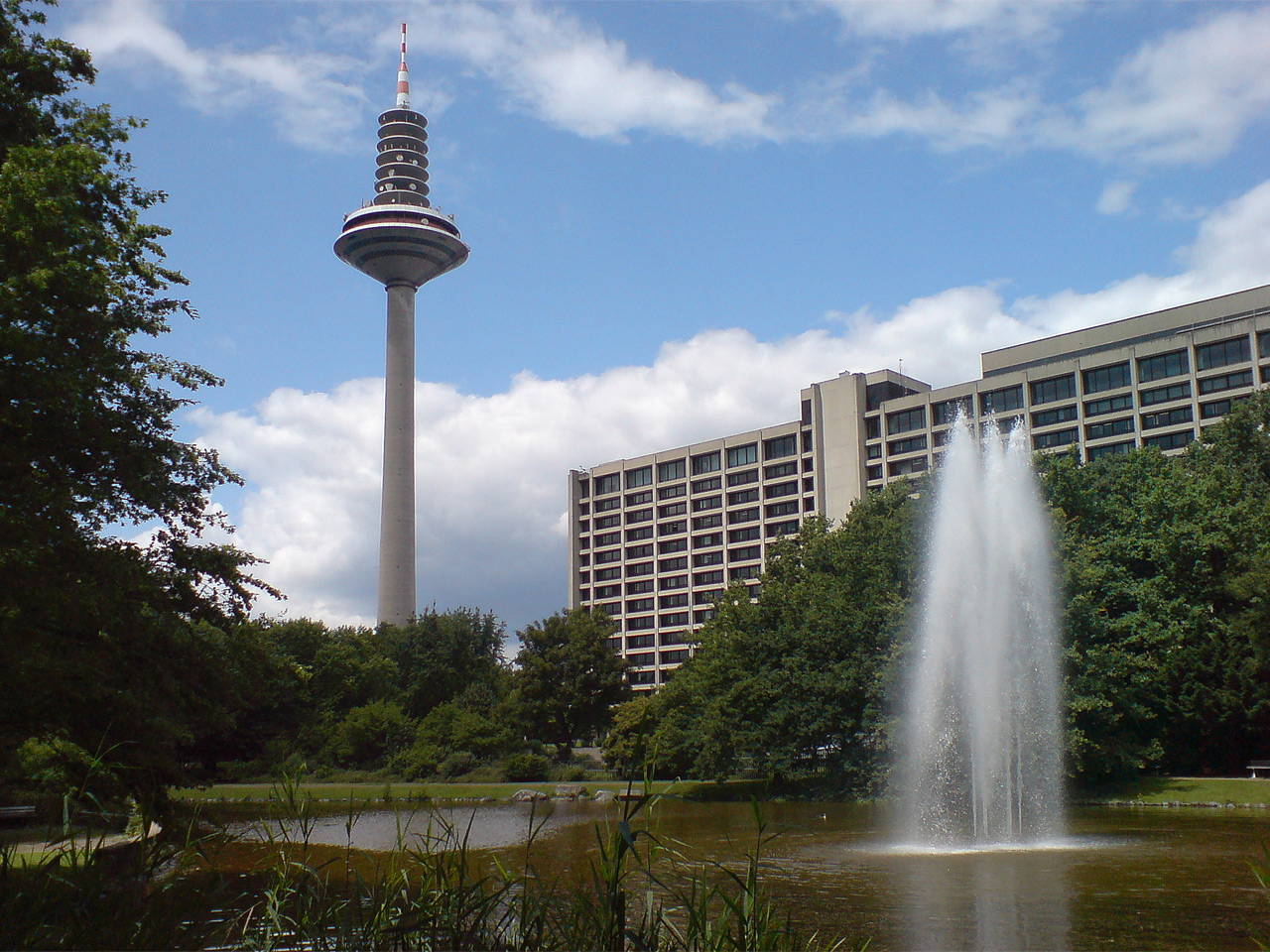 Teich in der Miquelanlage zwischen Miquelknoten und Europaturm (links) und Deutscher Bundesbank (rechts)